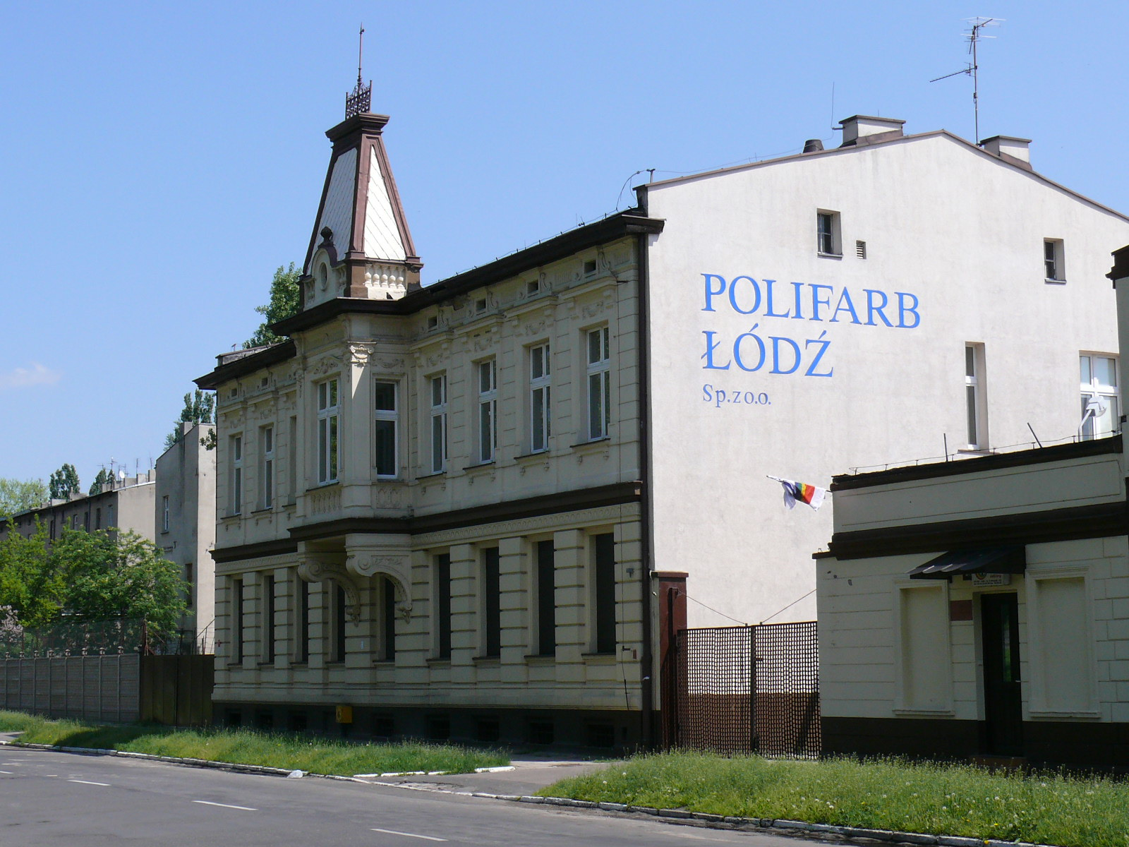 Polifarb Łódź ul. 6 Sierpnia 100/102 Łódź